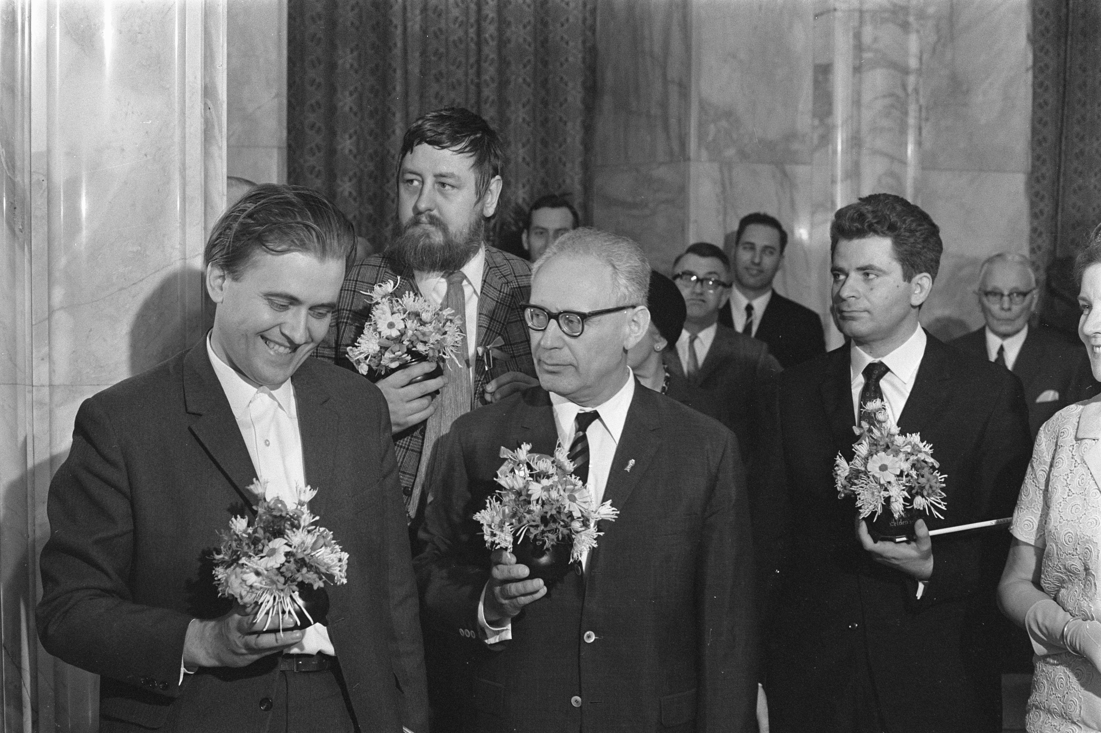 Collectie / Archief : Fotocollectie Anefo Reportage / Serie : Schaakvierkamp 1970 in Leiden Beschrijving : De loting met v.l.n.r. Larsen, Donner, Botwinnik en Spassky Datum : 16 april 1970 Locatie : Leiden, Zuid-Holland Trefwoorden : schaken, sport, toernooien, wedstrijden Persoonsnaam : Botwinnik, Michial, Donner, Hein, Larsen, Bent, Spassky, Boris Fotograaf : Fotograaf Onbekend / Anefo Auteursrechthebbende : Nationaal Archief Materiaalsoort : Negatief (zwart/wit) Nummer archiefinventaris : bekijk toegang 2.24.01.05 Bestanddeelnummer : 923-4485